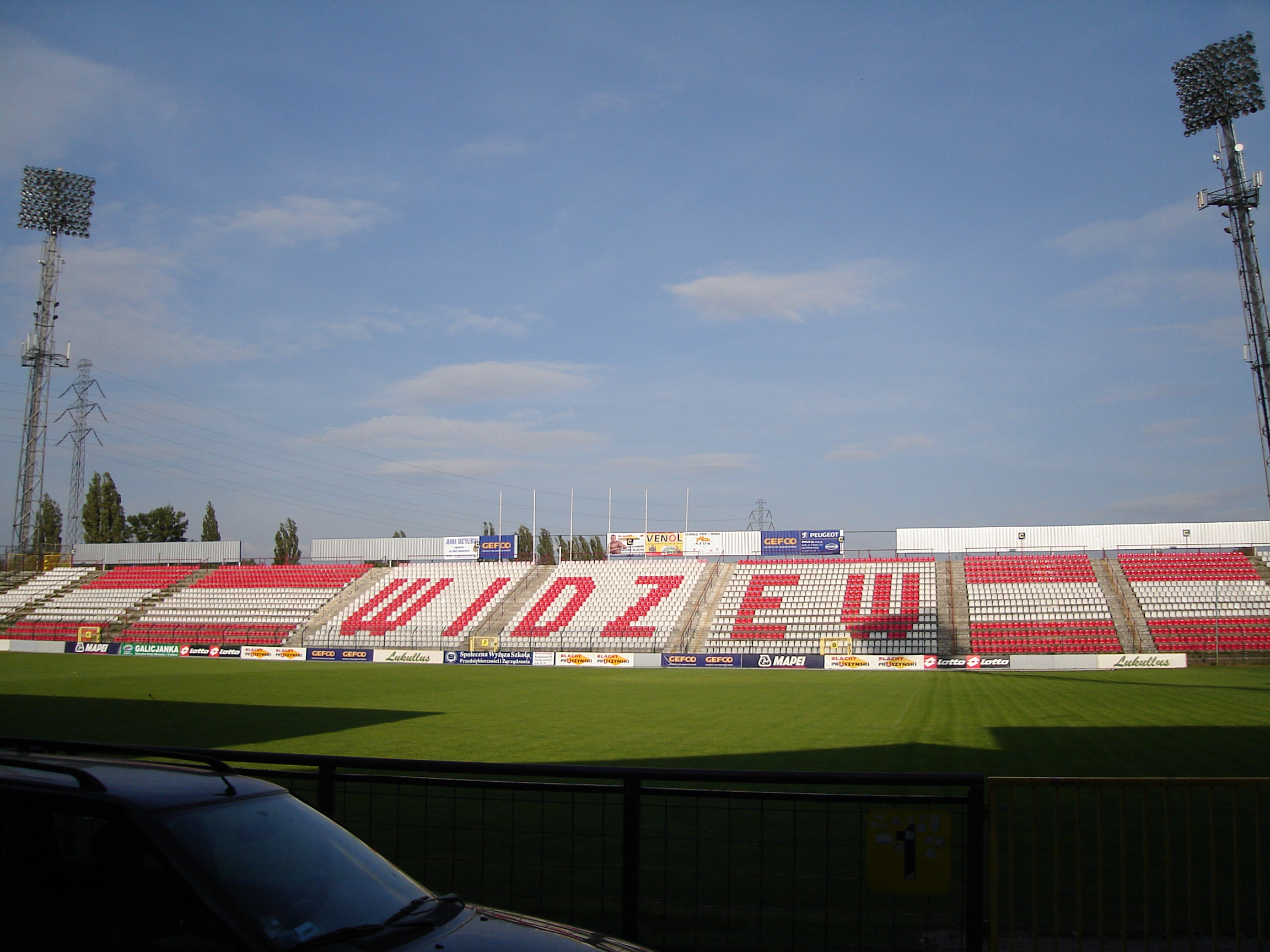 Stary stadion Widzewa Łódź - trybuna C